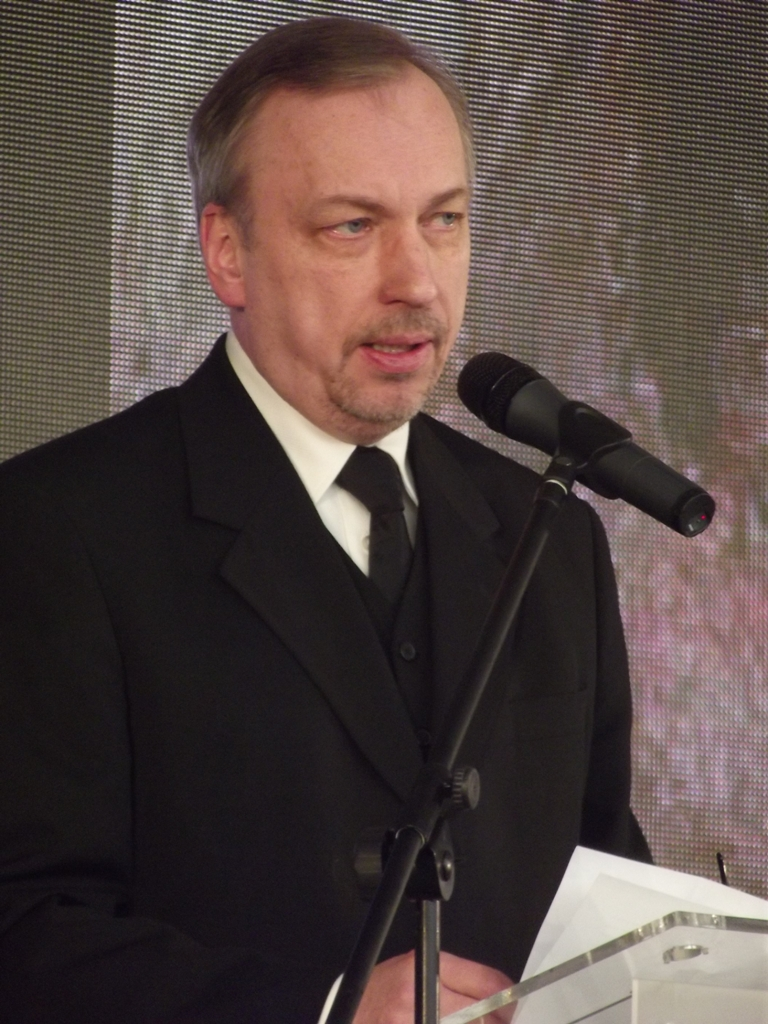 Zdjęcie zrobione podczas 68. rocznicy wyzwolenia nazistowskiego obozu koncentracyjnego KL Auschwitz - Birkenau.